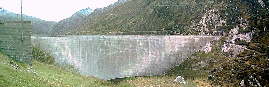 Staumauer Santa Maria, Graubünden (CH)